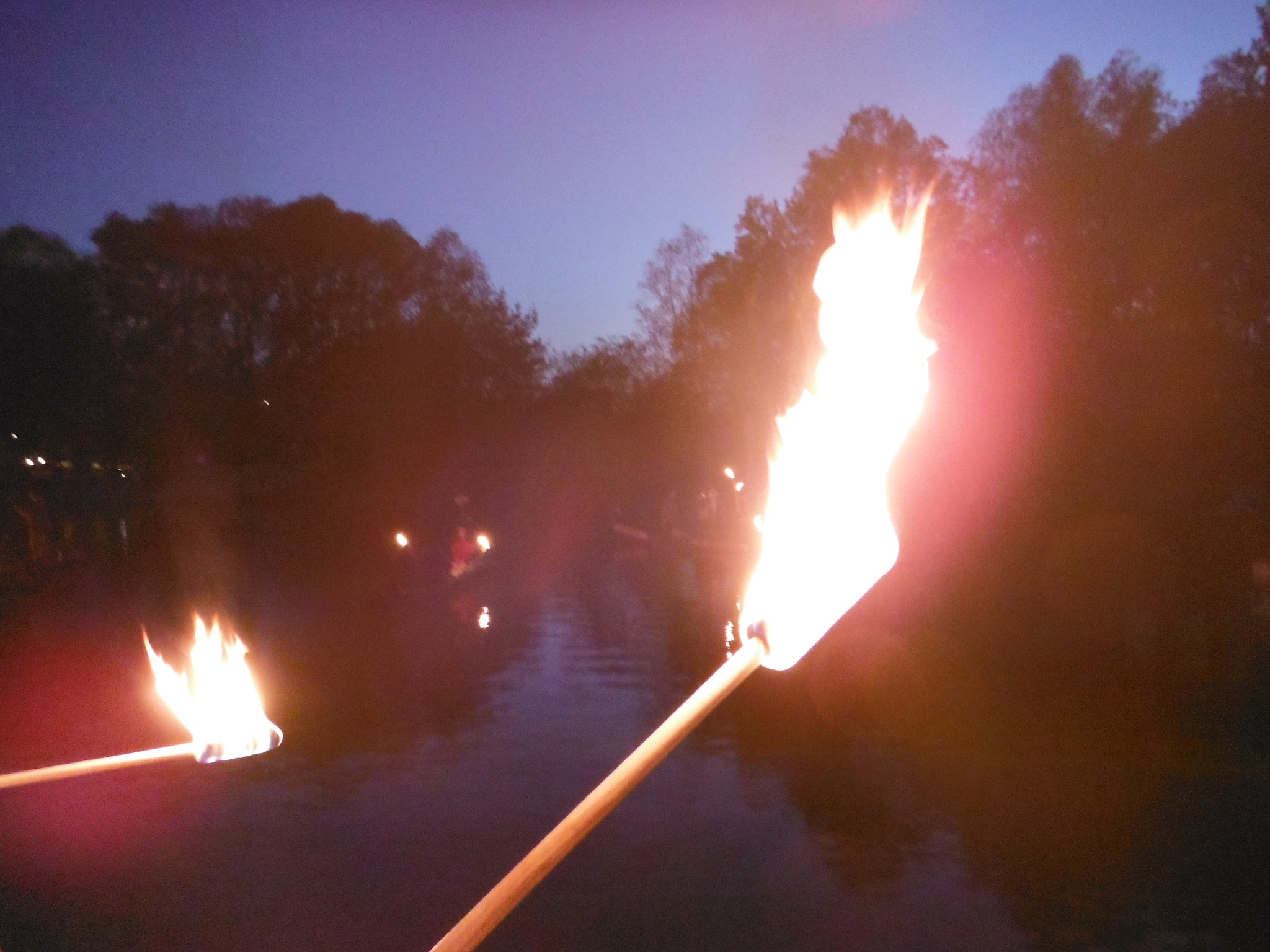 Flis Festiwal w Gassach w 2017 roku - nocne pływanie z pochodniami (tzw. flislight).